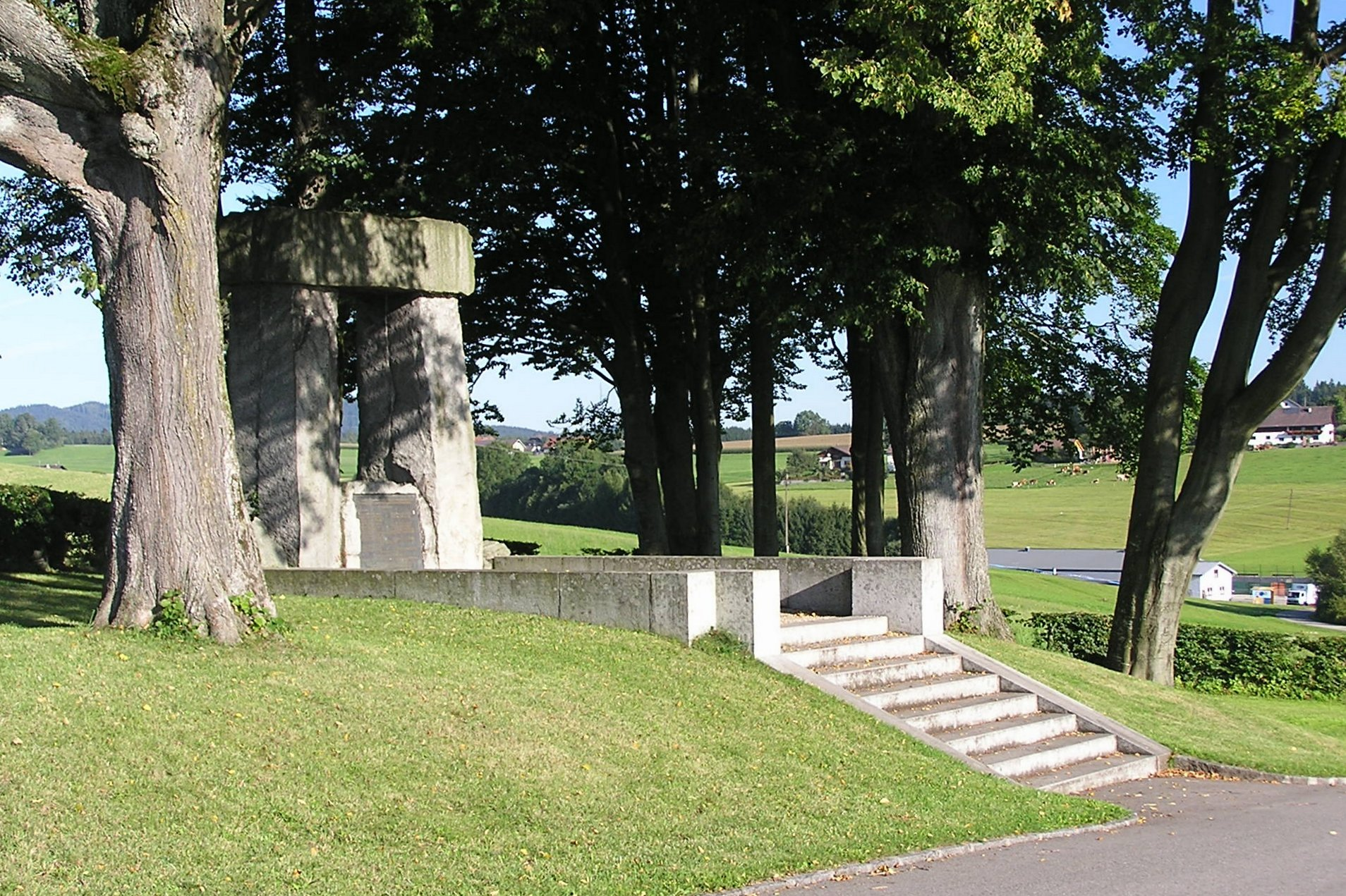 Denkmal am Schauplatz des Frankenburger Würfelspiels